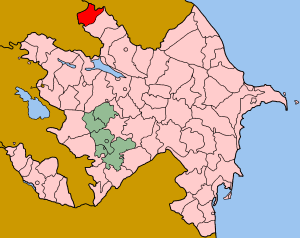 Map of Azerbaijan showing Balakan (Balakən) rayon.